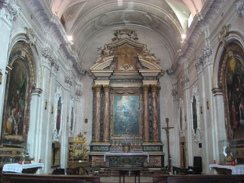 Cagli, Chiesa di Santa Chiara, Part. dell'interno.